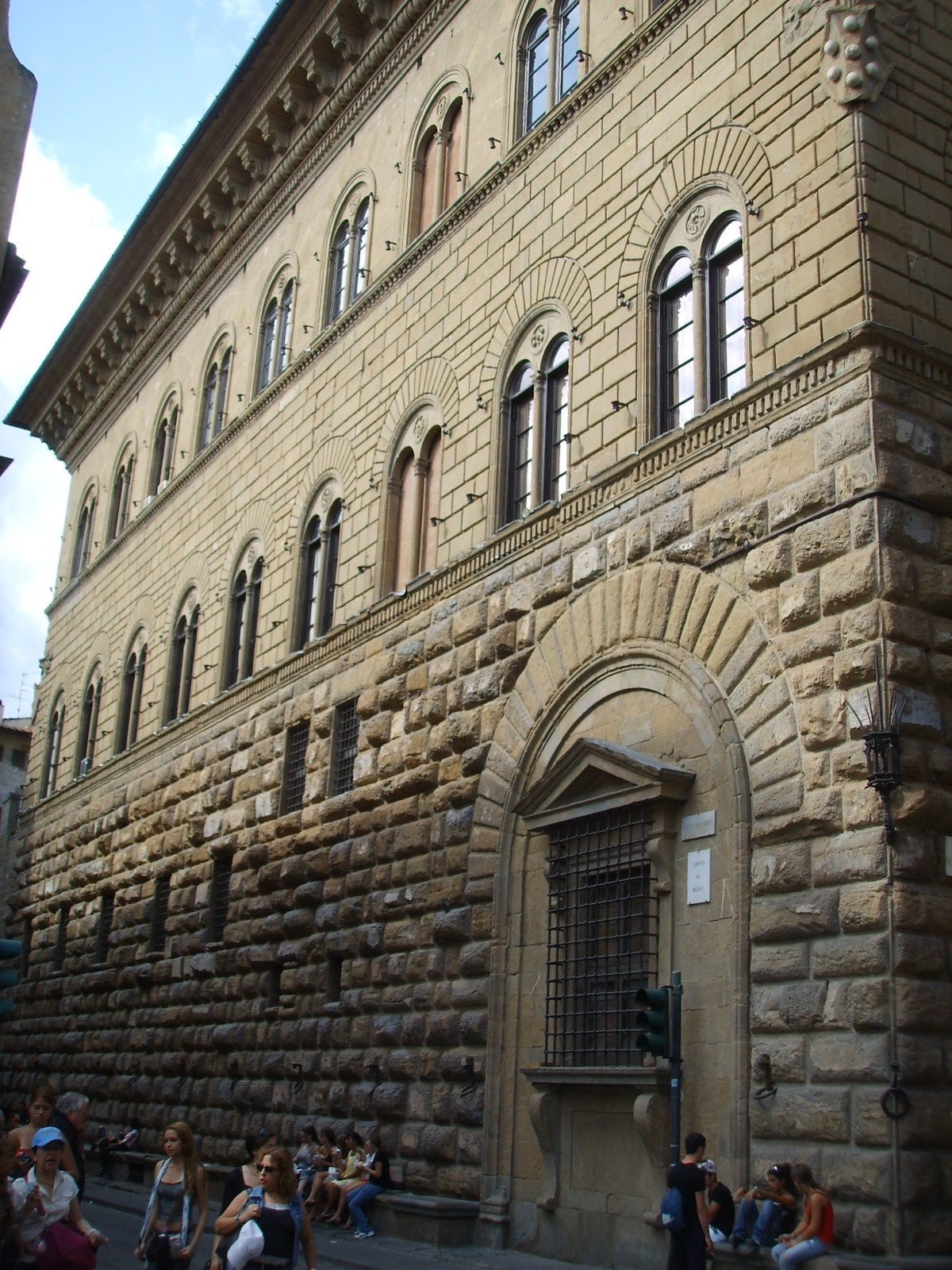 Palazzo Medici Riccardi in Florence, flank.